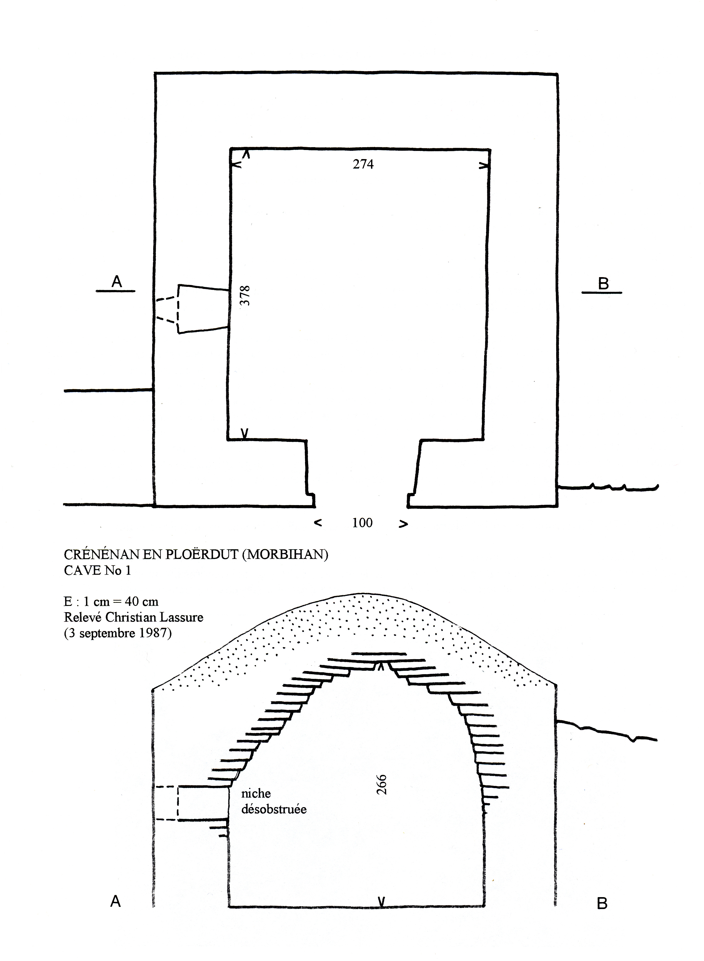 Ce bâtiment est l'une des quatre caves semi-enterrées indépendantes, toutes de même facture, construites sur le placître du hameau de Crénénan et de la chapelle Notre-Dame de Crénénan dans la première moitié du XIXe siècle. Elles servaient à entreposer les boissons et les provisions consommées par les participants au grand Pardon qui se déroulait chaque année le premier dimanche après le 15 août. Ces quatre caves sont de rares témoins de la petite architecture utilitaire liée aux fêtes religieuses bretonnes.